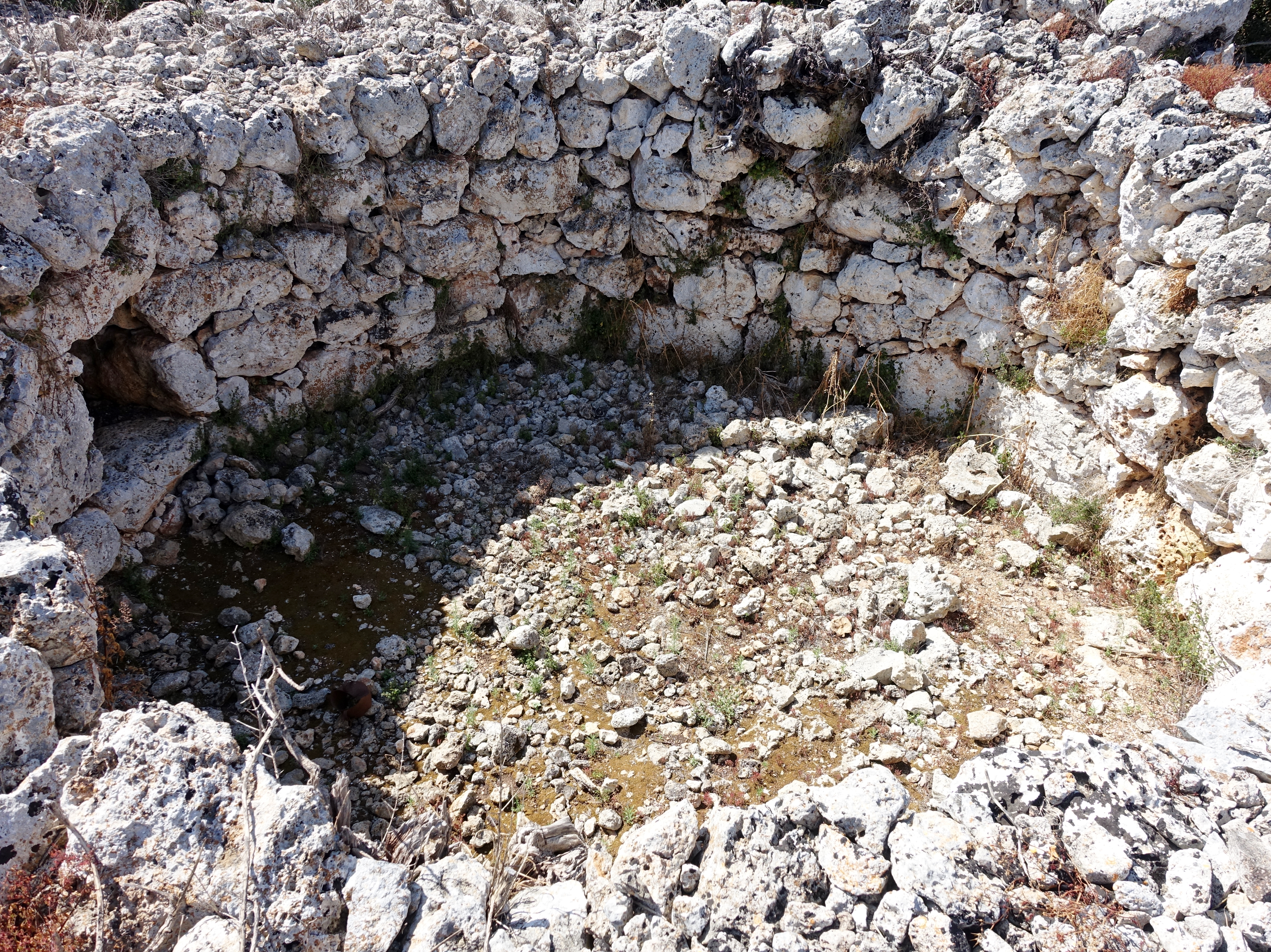 Talaiot de Binifat, Gemeinde Sencelles, Mallorca, Spanien